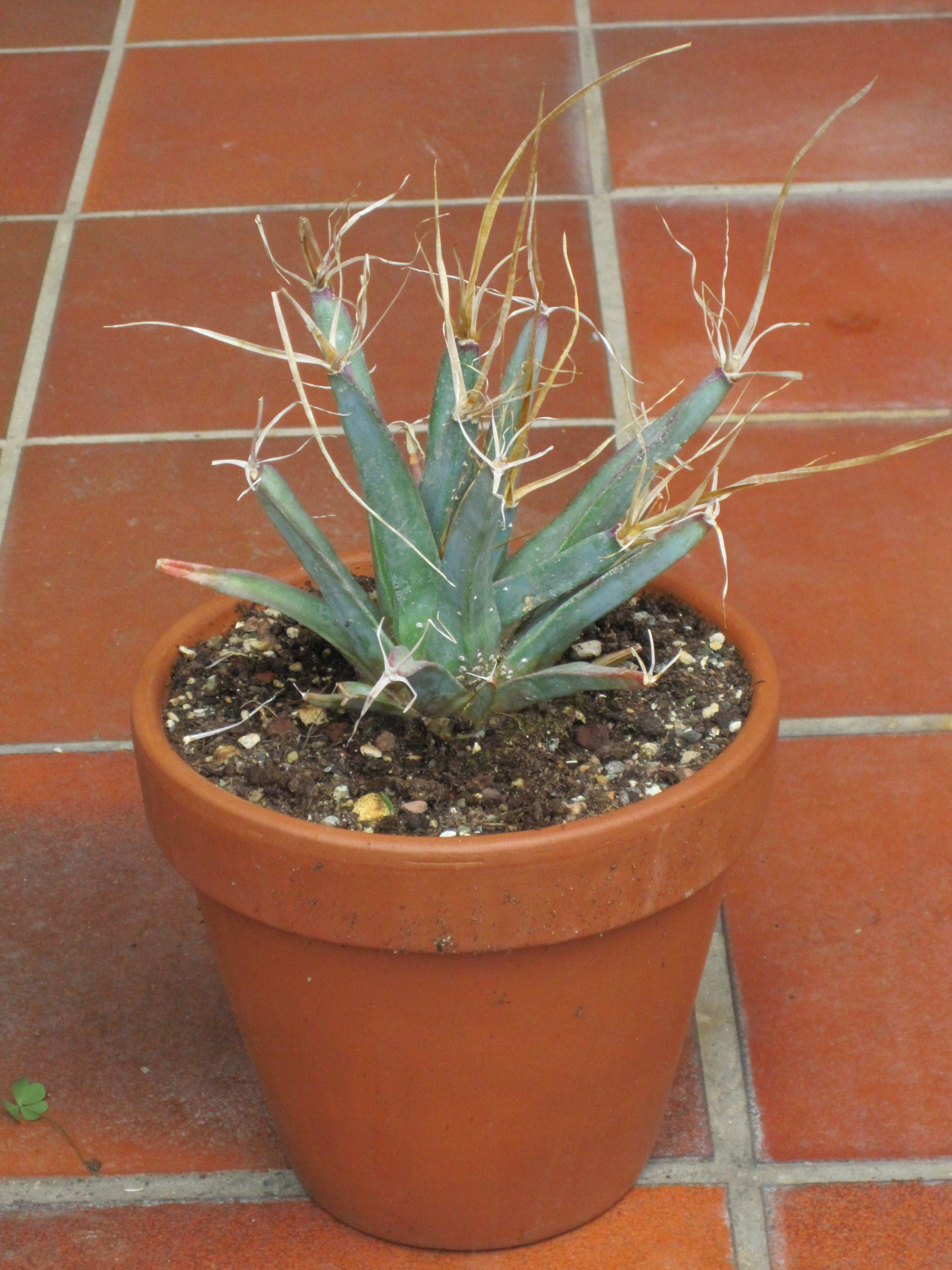 Leuchtembergia principis